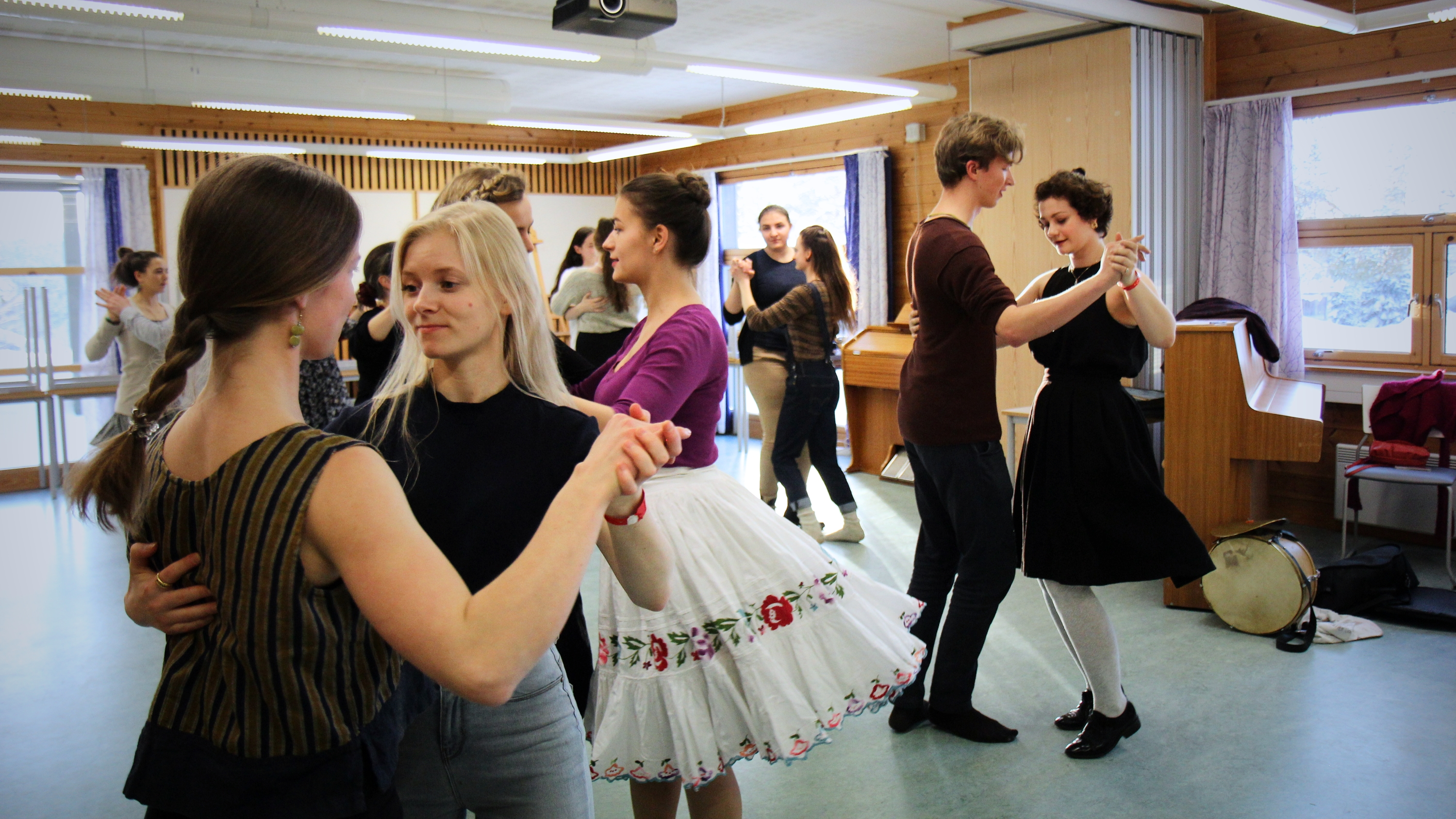 Danse workshop under Rauland internasjonale Vinterfestival 2018